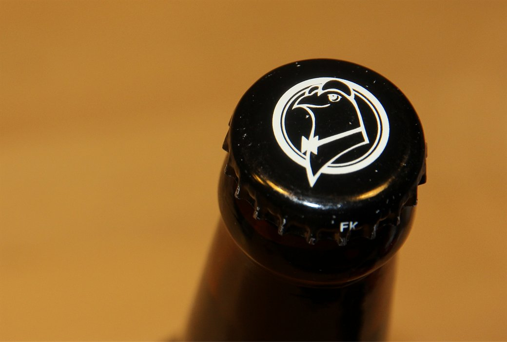 Teerenpeli on vuonna 1995 Lahdessa perustettu suomalainen panimo ja tislaamo. Sittemmin yritys on perustanut omia panimoravintoloitaan useaan eteläisen Suomen kaupunkiin. Panimo on voittanut oluillaan palkintoja esimerkiksi Suomen Paras Olut -kilpailussa.